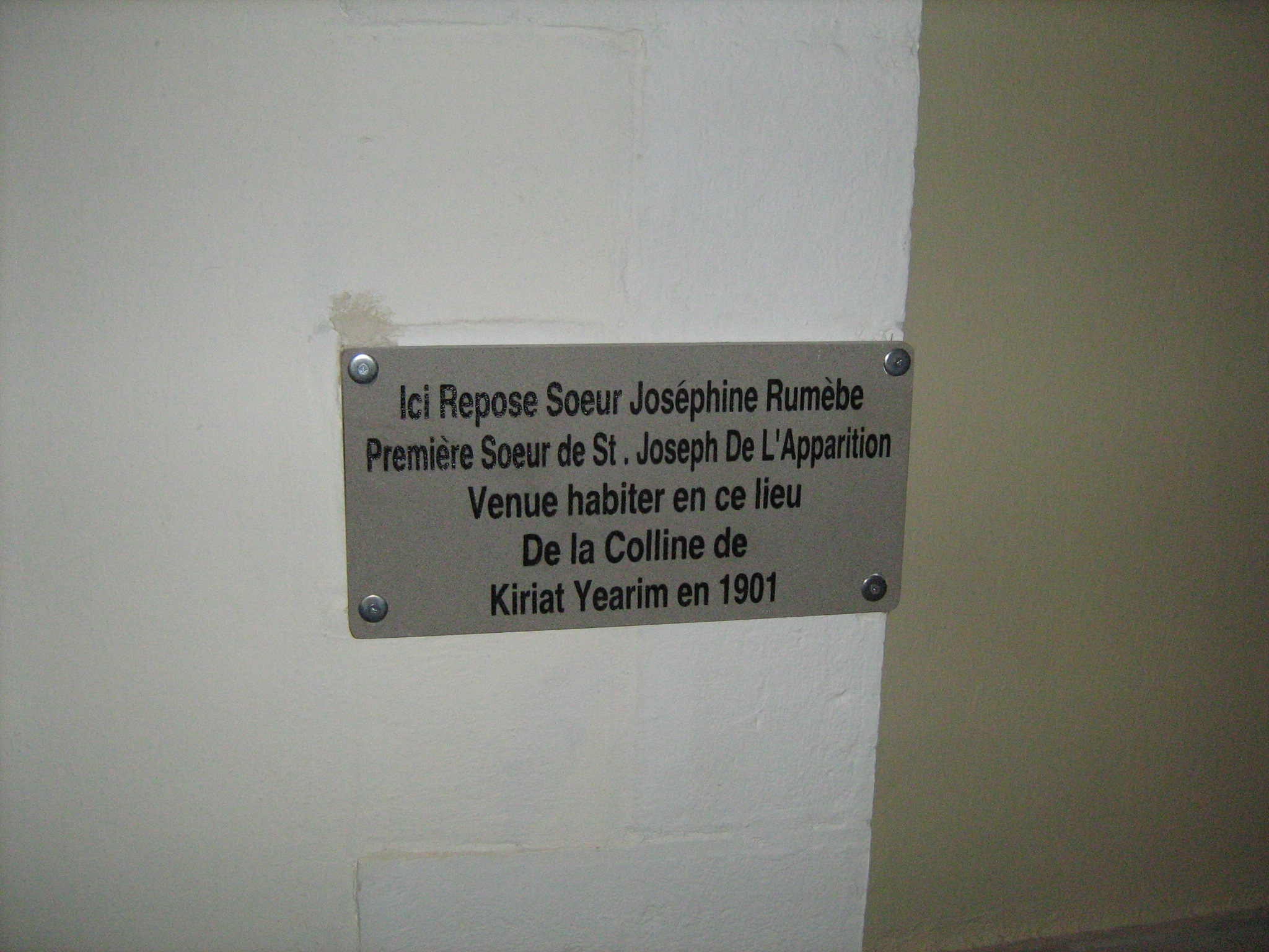 כנסיית גבירתנו של ארון הברית באבו גוש